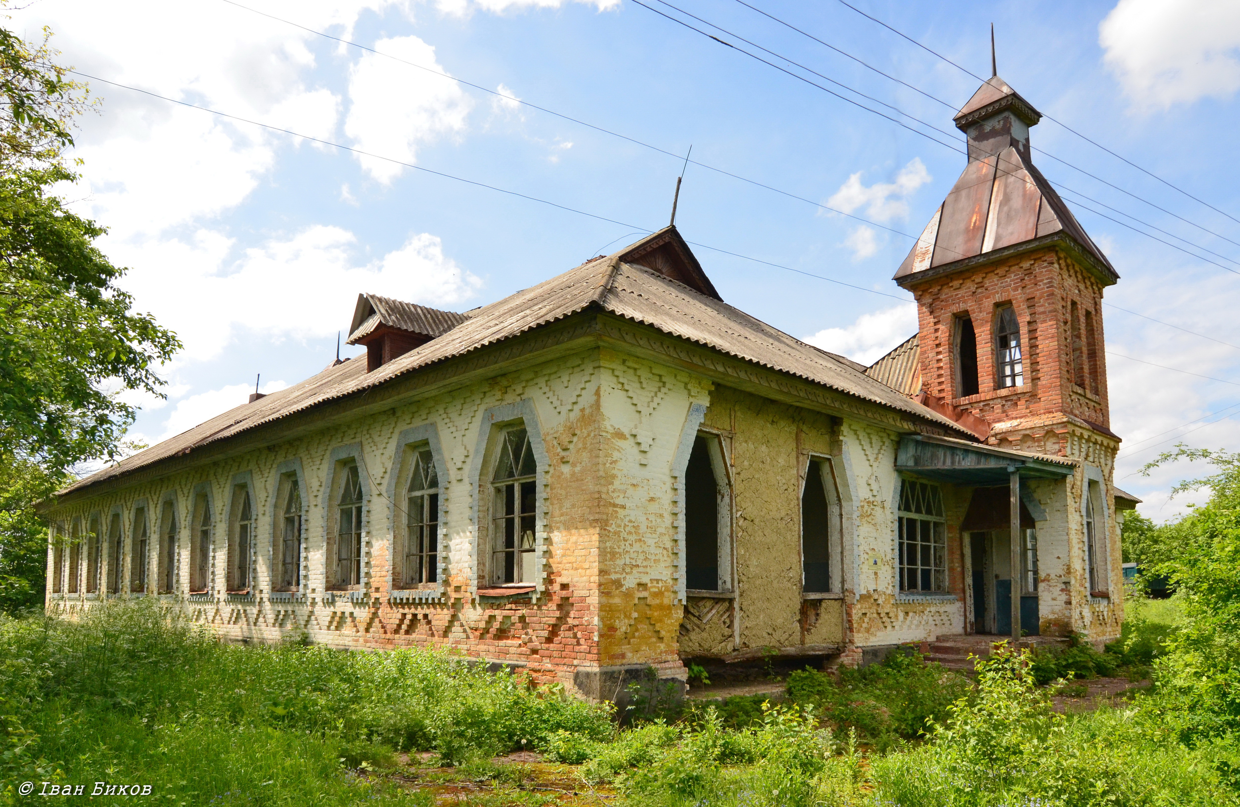 с. Харсіки. Земська трикомплектна школа. 1913 р. Стиль - український модерн. Архітектор - Опанас Сластіон.